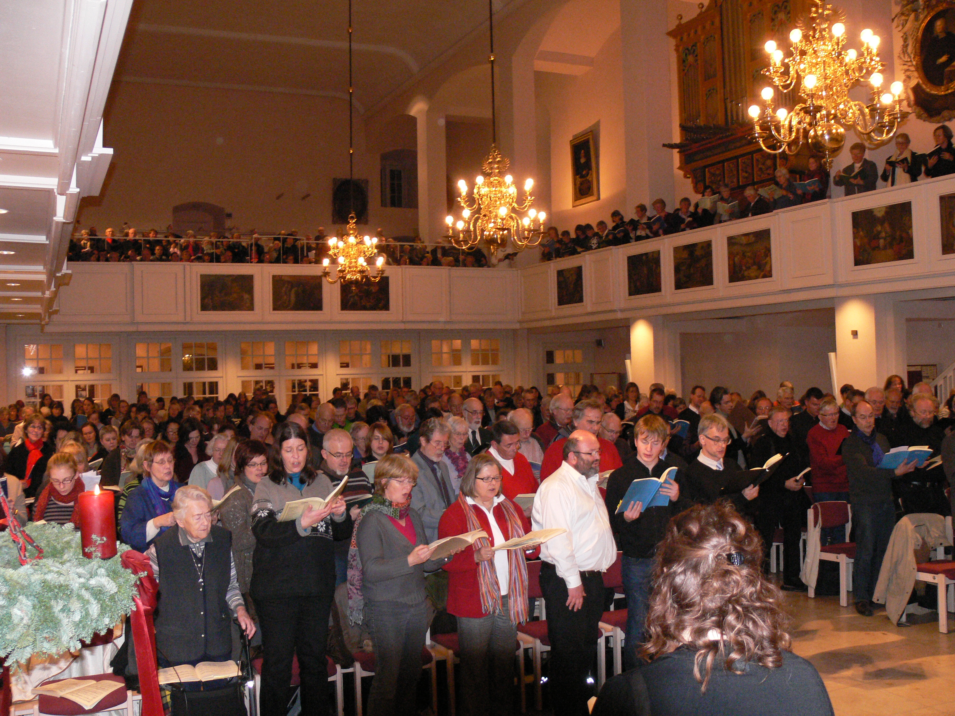 Singalong in der Neustädter Hof- und Stadtkirche St. Johannis, Hannover am 4. Advent 2011